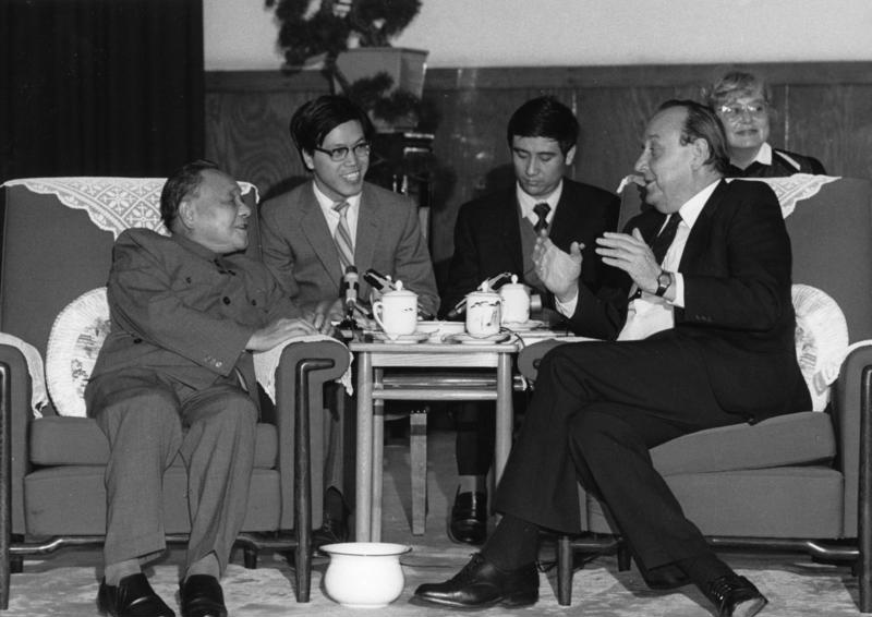 Peking, 29. Oktober 1985 Der Bundesminister des Auswärtigen, Hans-Dietrich Genscher, stattete vom 27. bis 31. Oktober 1985 der Volksrepublik China einen offiziellen Besuch ab. Während seines Aufenthaltes in Peking führte er politische Gespräche mit seinem chinesischen Amtskollegen Wu Xueqian. Er wurde auch von Deng Xiaoping, Mitglied des Ständigen Ausschusses des Politbüros der Kommunistischen Partei Chinas, sowie von dem Stellvertretenden Ministerpräsidenten Li Peng empfangen. Am 29. Oktober wurde die Handelsförderungsgestelle in Peking eingeweiht. Am 30. Oktober besuchte der Bundesaußenminister die Kanton-Messe. Bundesaußenminister Genscher (rechts) hier im Gespräch mit Deng Xiaoping in der Großen Halle des Volkes.